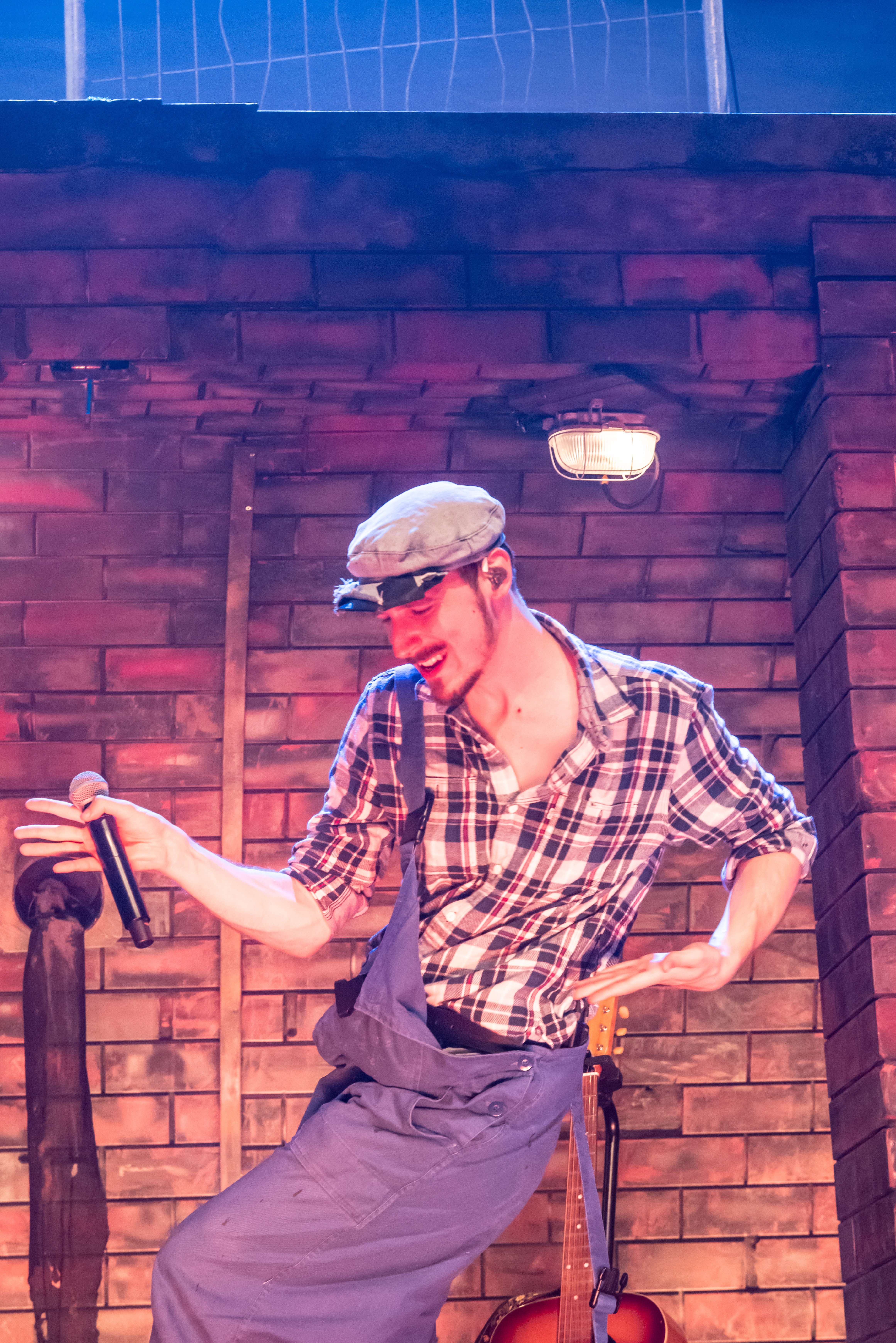 Bilder vom Zelt Musik Festival 2018 in Freiburg im Breisgau Auftritt Alligatoah und Sebel am 20. Juli 2018 im Zirkuszelt